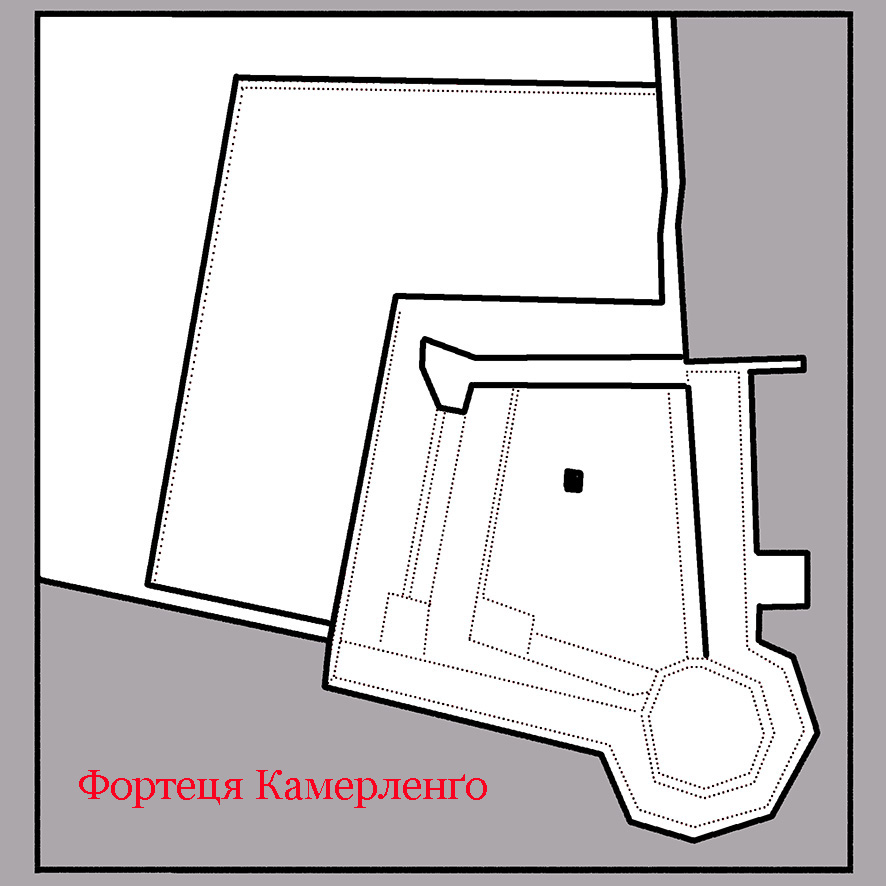 Фортеця Камерленґо. Схема